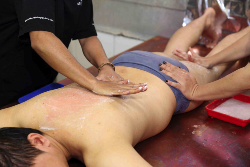 fotobalur